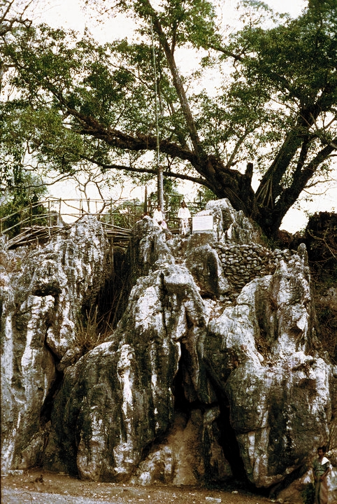 Local onde morreu o Alferes Francisco Duarte,o Arbiru,em 17 de julho de 1899.